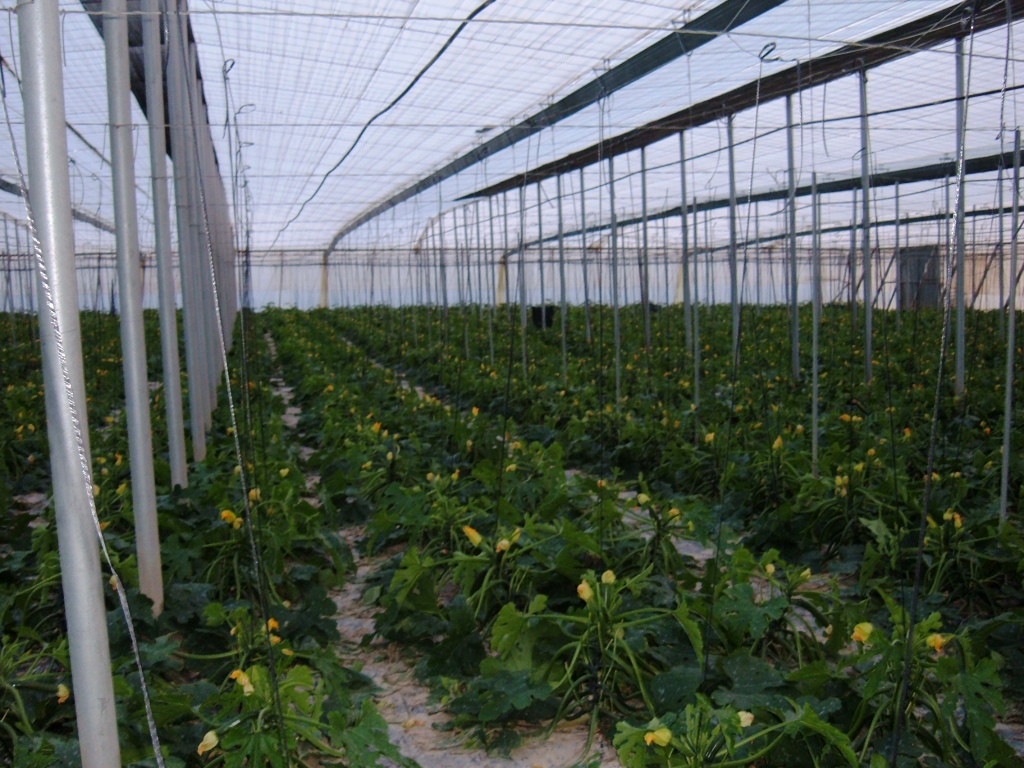 Plantación intensiva de calabacín